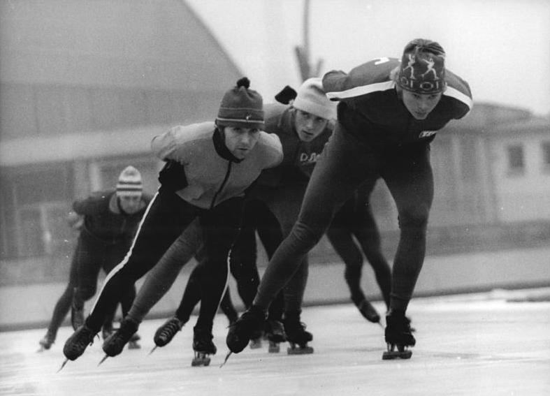 Harald Oehme, Manfred Winter, Klaus Wunderlich ADN-ZB Mittelstädt 30.10.75-str-Berlin: Auf de Eisbahnen der DDR zeichnen die langen Kufen wieder Spuren in das Eis. Für die Eisschnelläufer der DDR hat die neue Saison schon mit bemerkenswerten Bestmarken begonnen. Im Sportforum in Hohenschönhausen beobachtete der Reporter drei neue DDR-Rekordhalter beim Training. Harald Oehme (TSC-vorn rechts) über 1000m, Manfred Winter (SC Karl-Marx-Stadt-vorn links) über 5000m, 10 000m und im Vierkampf, sowie Klaus Wunderlich (TSC-Mitte) über 1500m setzten zu Beginn einer olympischen Saison neue DDR-Bestleistungen. Am 1. und 2.11. wollen sie im Wettlauf auf dieser Bahn ihre gute Form bestätigen. Abgebildete Personen: Oehme, Harald: Eisschnelläufer, DDR Winter, Manfred: Eisschnelläufer, SC Karl-Marx-Stadt, DDR Wunderlich, Klaus: Eisschnelläufer, TSC Berlin, Olympiateilnehmer 1976, DDR